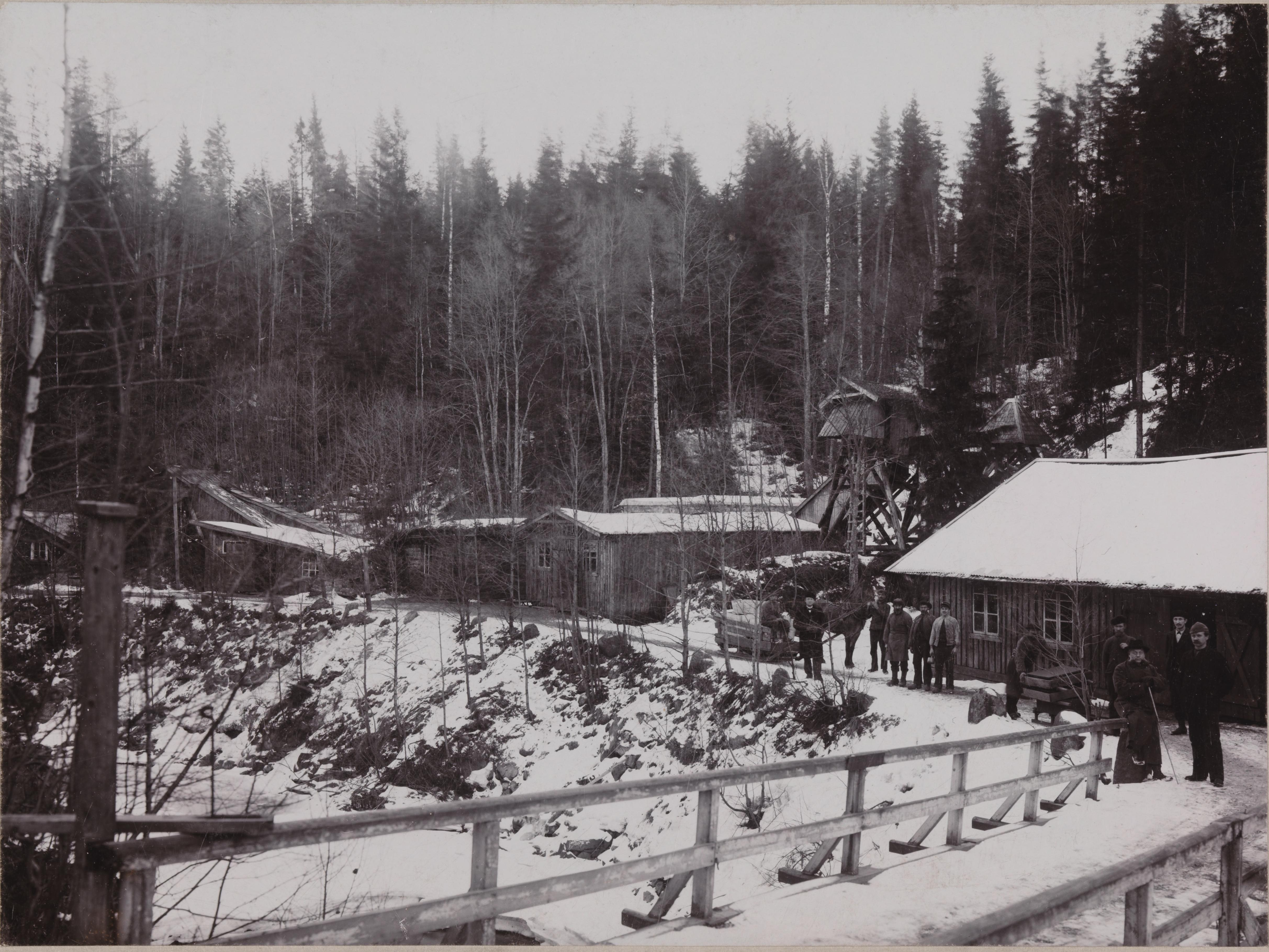 Bildet er hentet fra Nasjonalbibliotekets bildesamling. Anmerkninger til bildet var: Tittel hentet fra påskrift på komponentnr 1 Nordmarka, Nittedal, Akershus Depicted person: Frølich, Georg